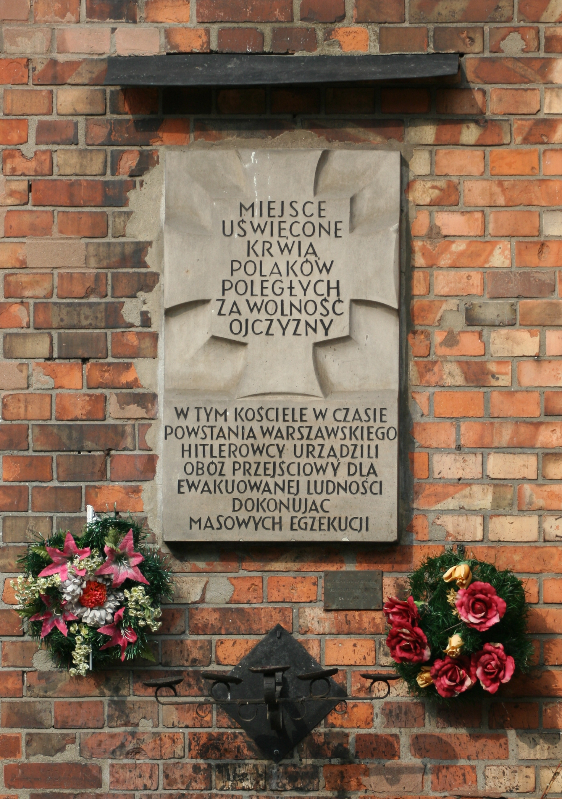 Kościół św. Wojciecha w Warszawie - tablica pamiatkowa